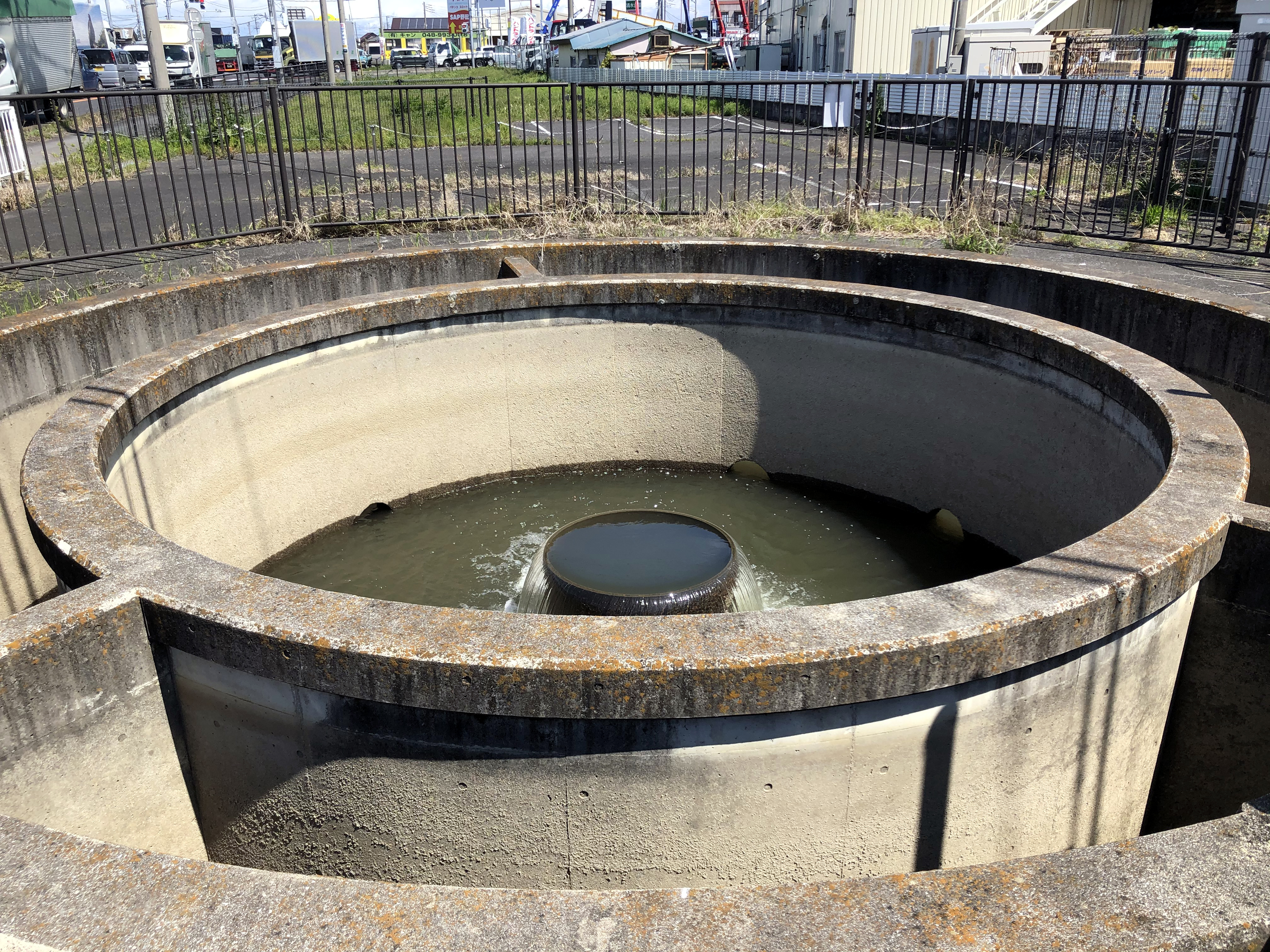 吉川市 金野井分水工（金野井用水路）